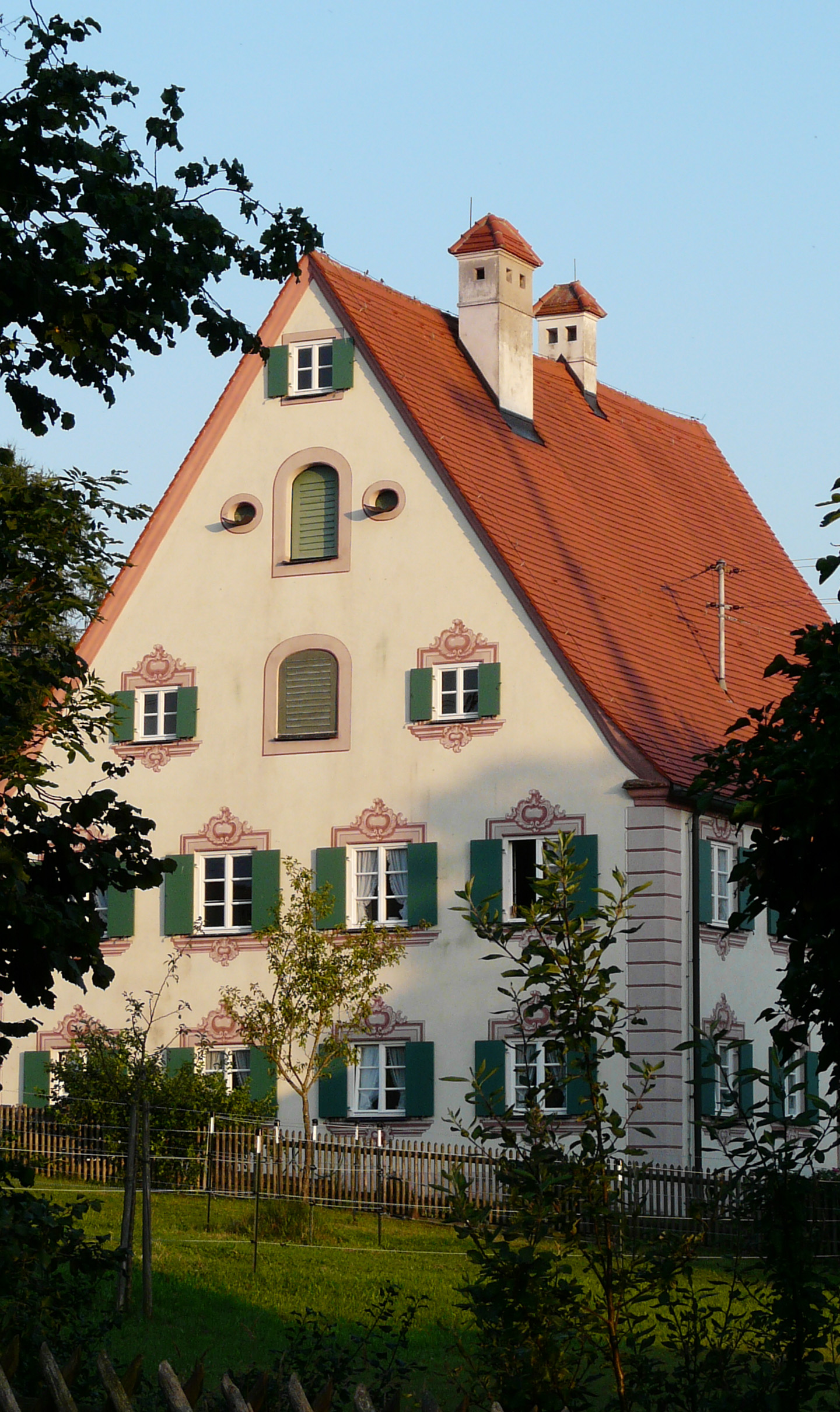 Pfarrhof in Frankenried, Mauerstetten